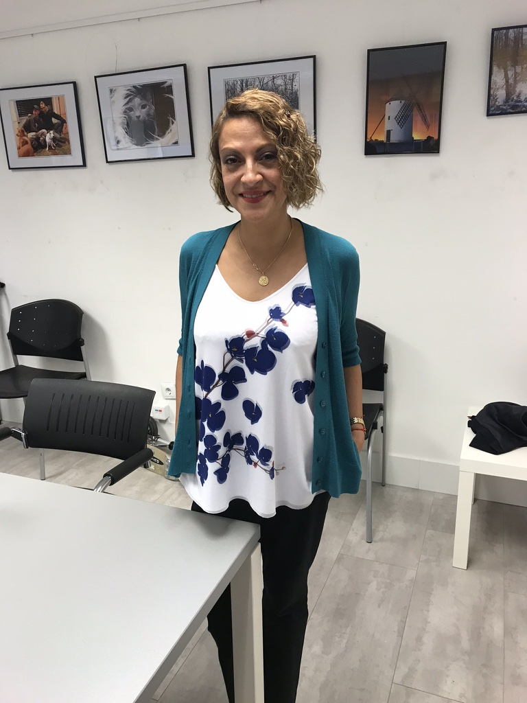 Jineth Bedoya en Madrid presentación Manual para periodistas para el tratamiento sobre violencia de género. Organización Internet Oxfam